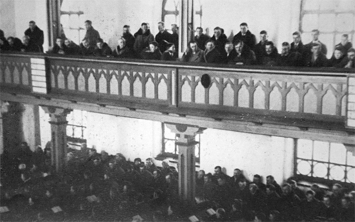 Луцька кірха всередині під час служби.